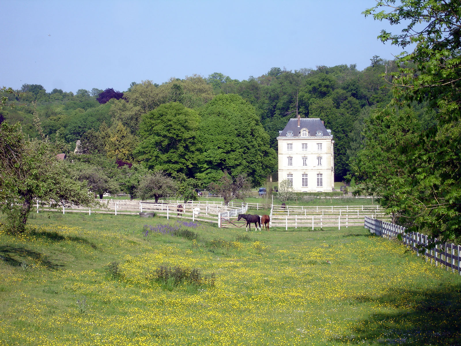 Le hameau d'Hérivaux, écart de Luzarches, Val-d'Oise, France. Le domaine abrite les ruines de l'abbaye du XIIe siècle, et un bâtiment conventuel du XVIIIe siècle, devenu une résidence de standing.